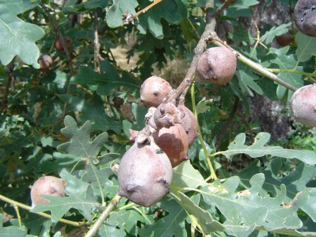 Agallas Quercus pyrenaica. Valle Amblés (Ávila) Spain